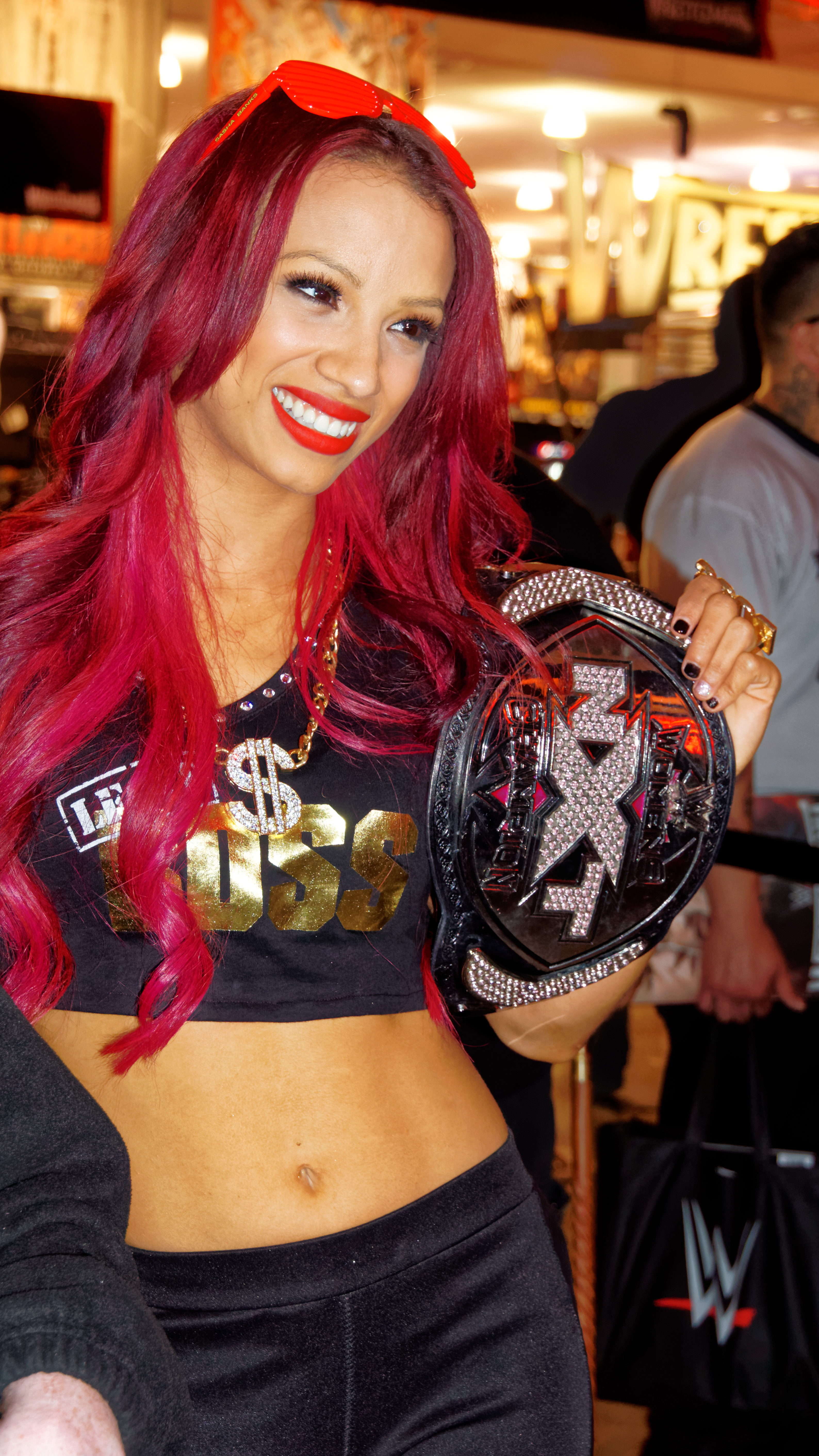 2015-03-26_19-54-18_ILCE-6000_2177_DxO